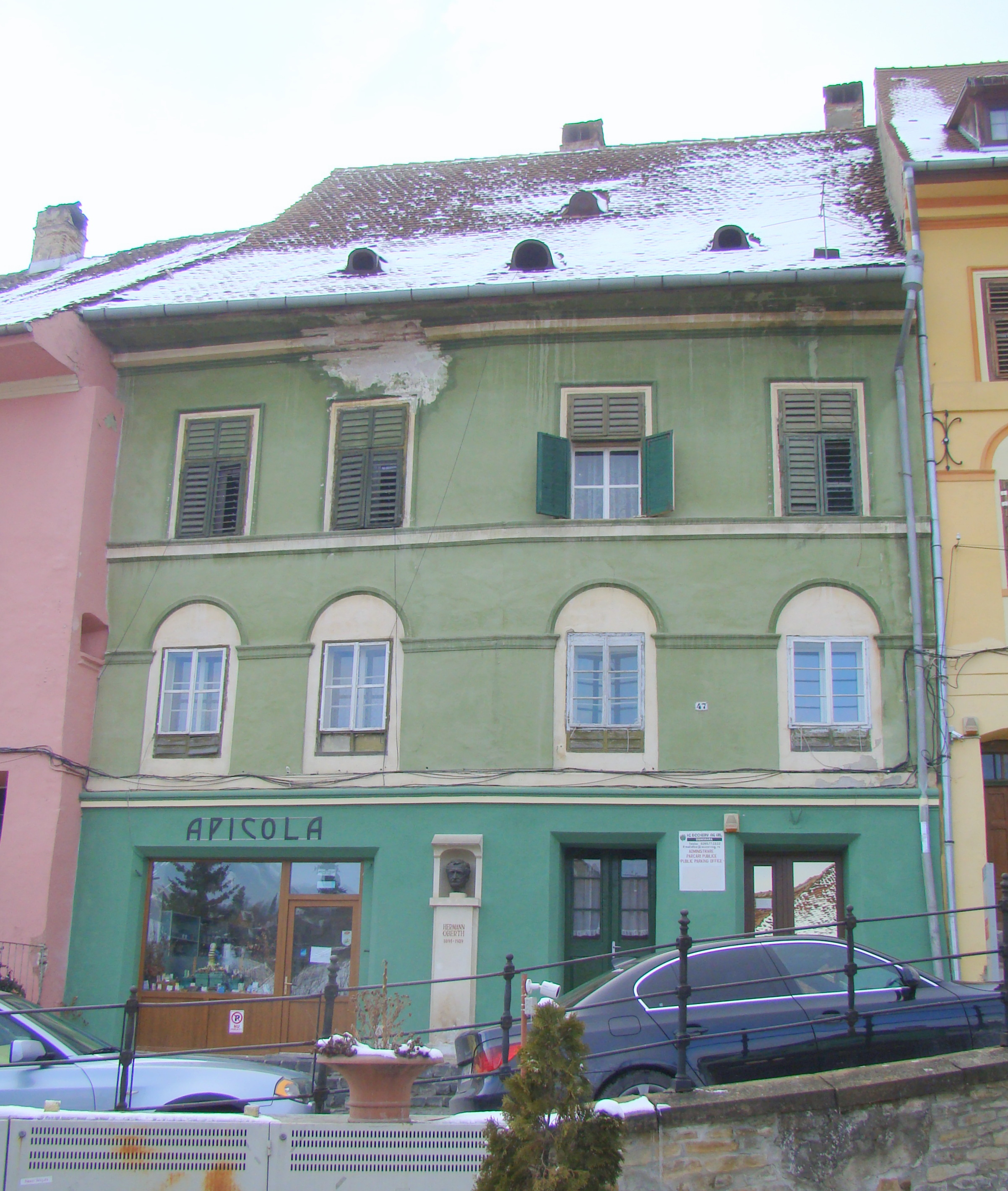 Casa Manchen, municipiul Sighișoara, Piața Oberth Hermann 47 sec. XVII, sec. XIX